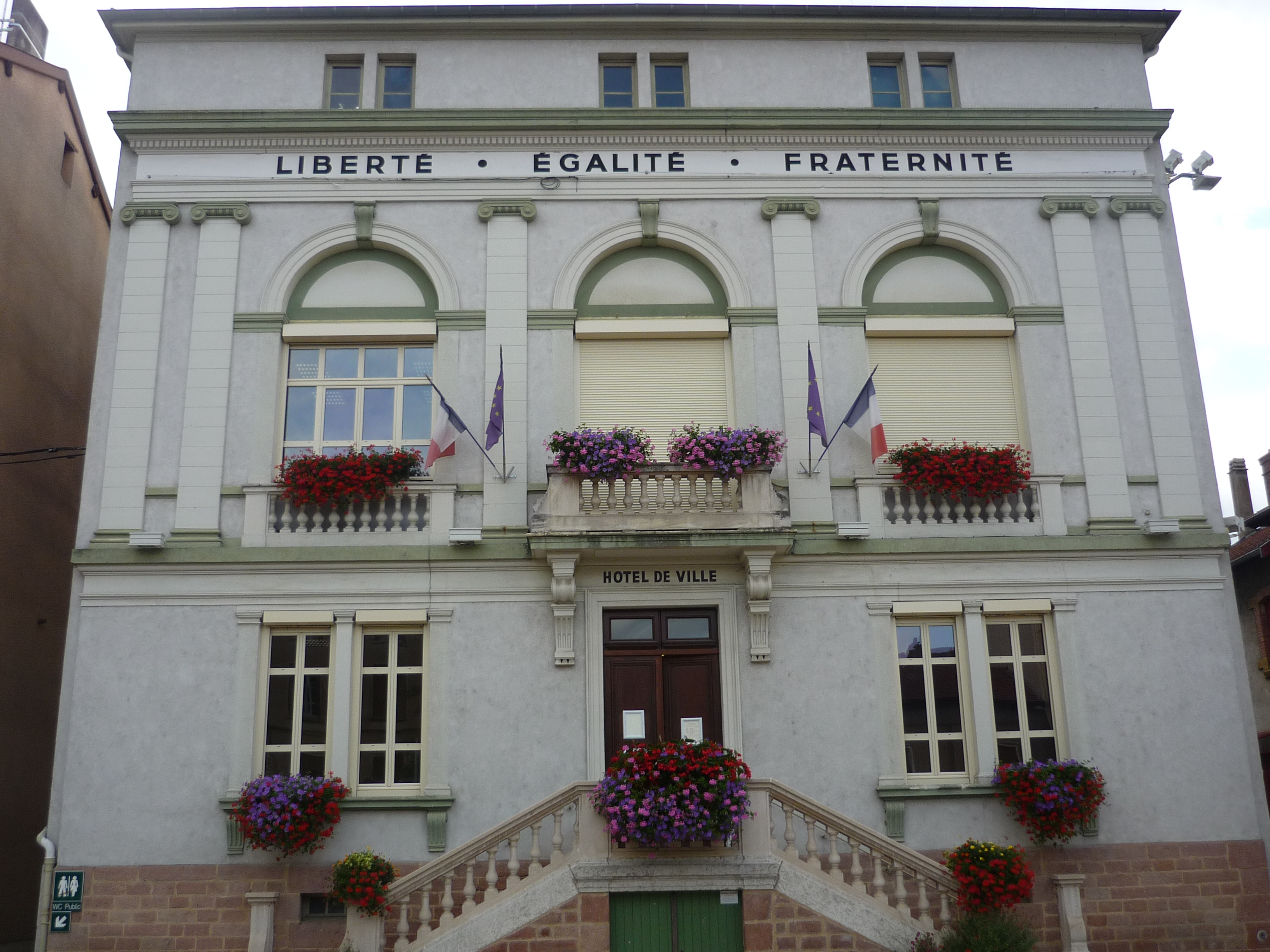 Mairie de la commune de Pontcharra-sur-Turdine dans le département du Rhône